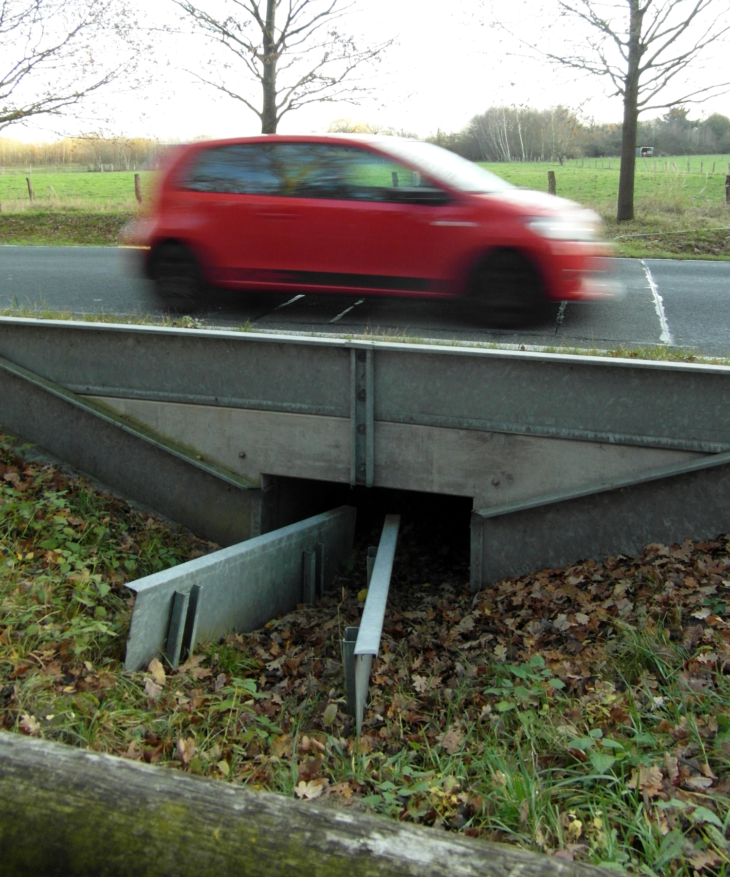 "Krötentunnel" an der Lenther Chaussee in Hannover-Badenstedt